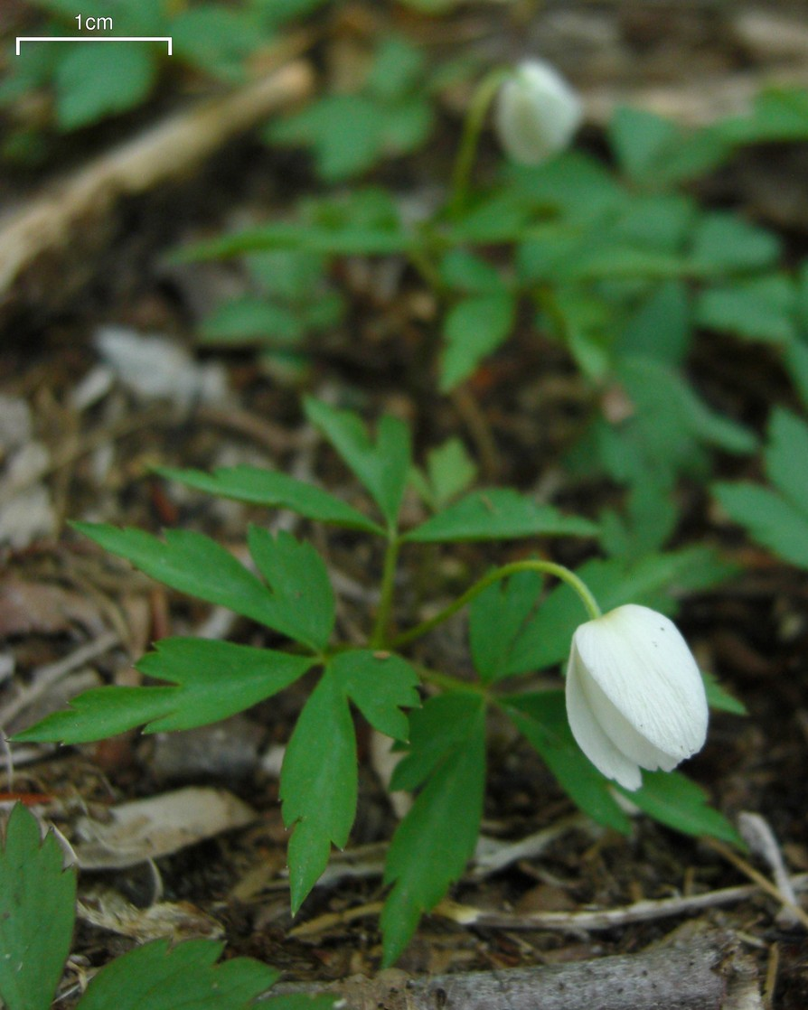 Anemone quinquefolia 20100411.218 US, NC, Smoky Mountains, Cataloochee